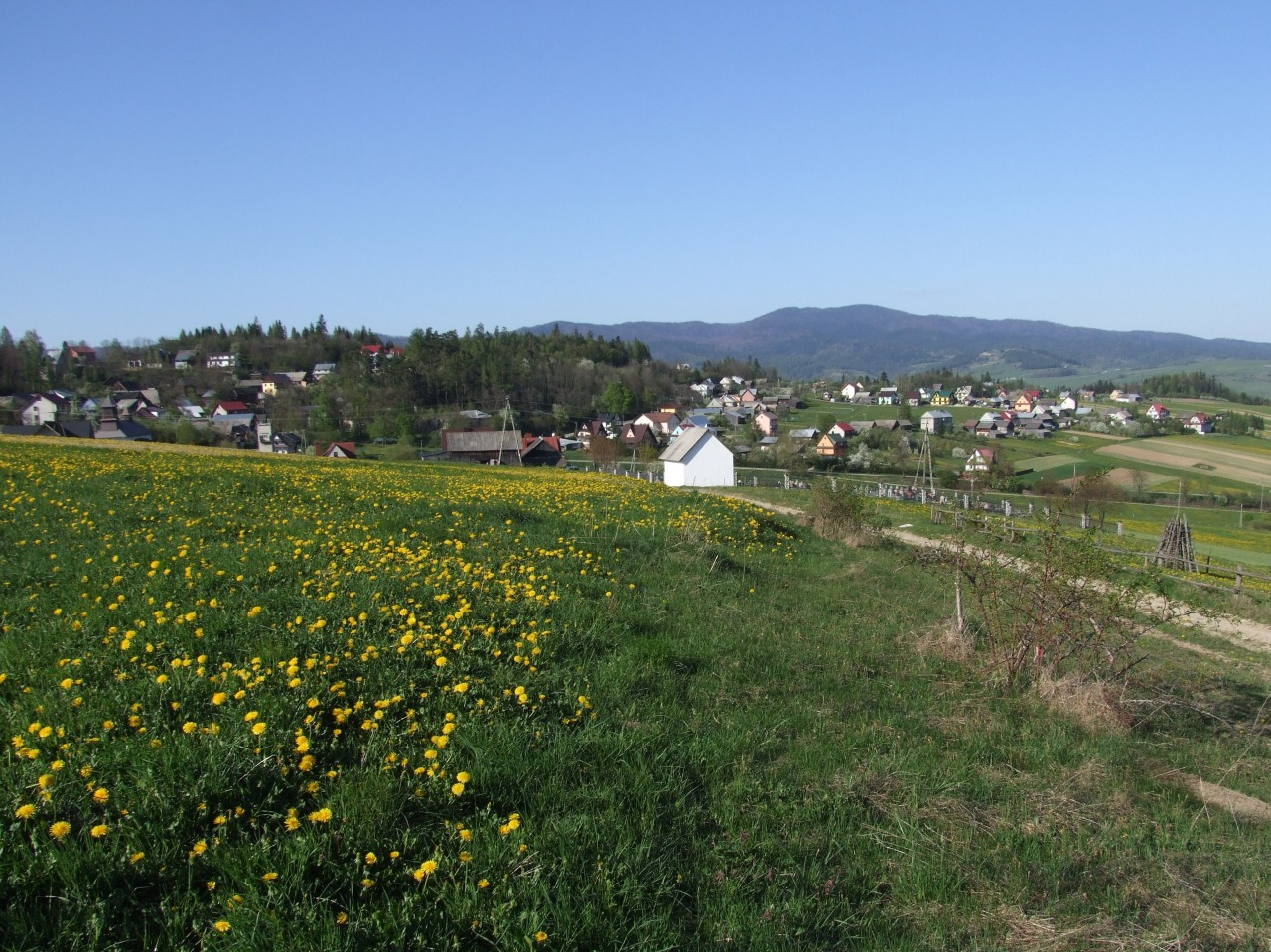 Falsztyn nad Jeziorem Czorsztyńskim, w głębi Pasmo Lubania